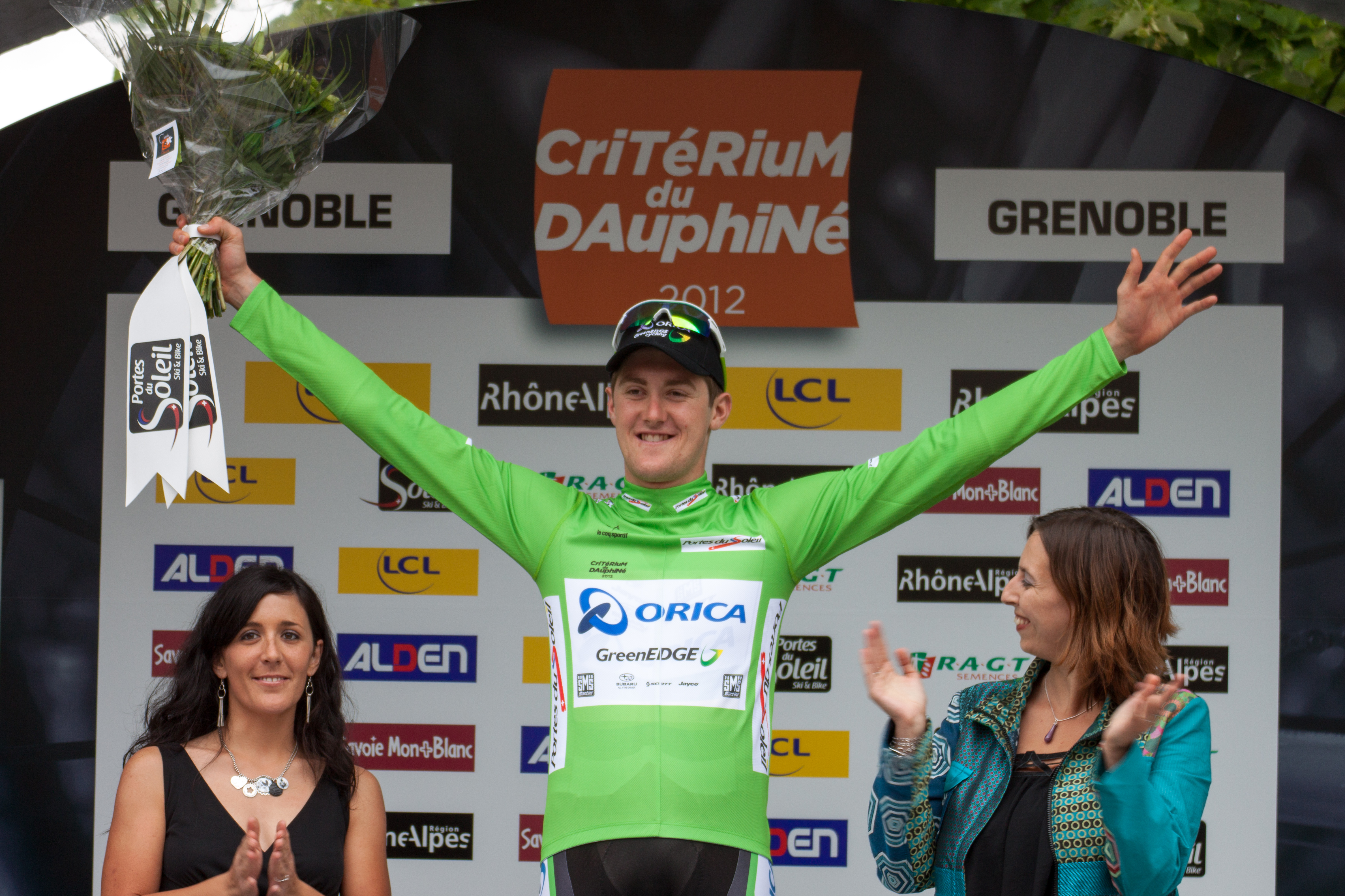 Luke Durbridge lors du Prologue du Critérium du Dauphiné 2012